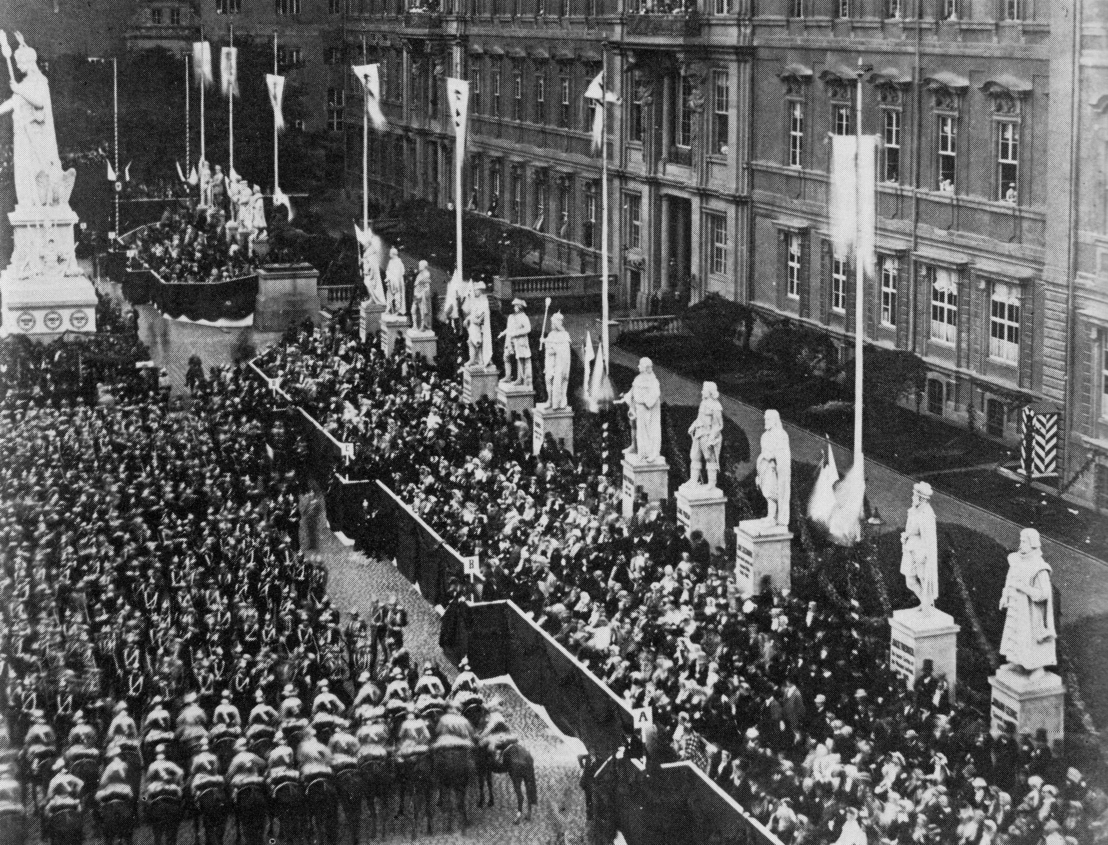 Empfang für die preußischen Truppen in Berlin.